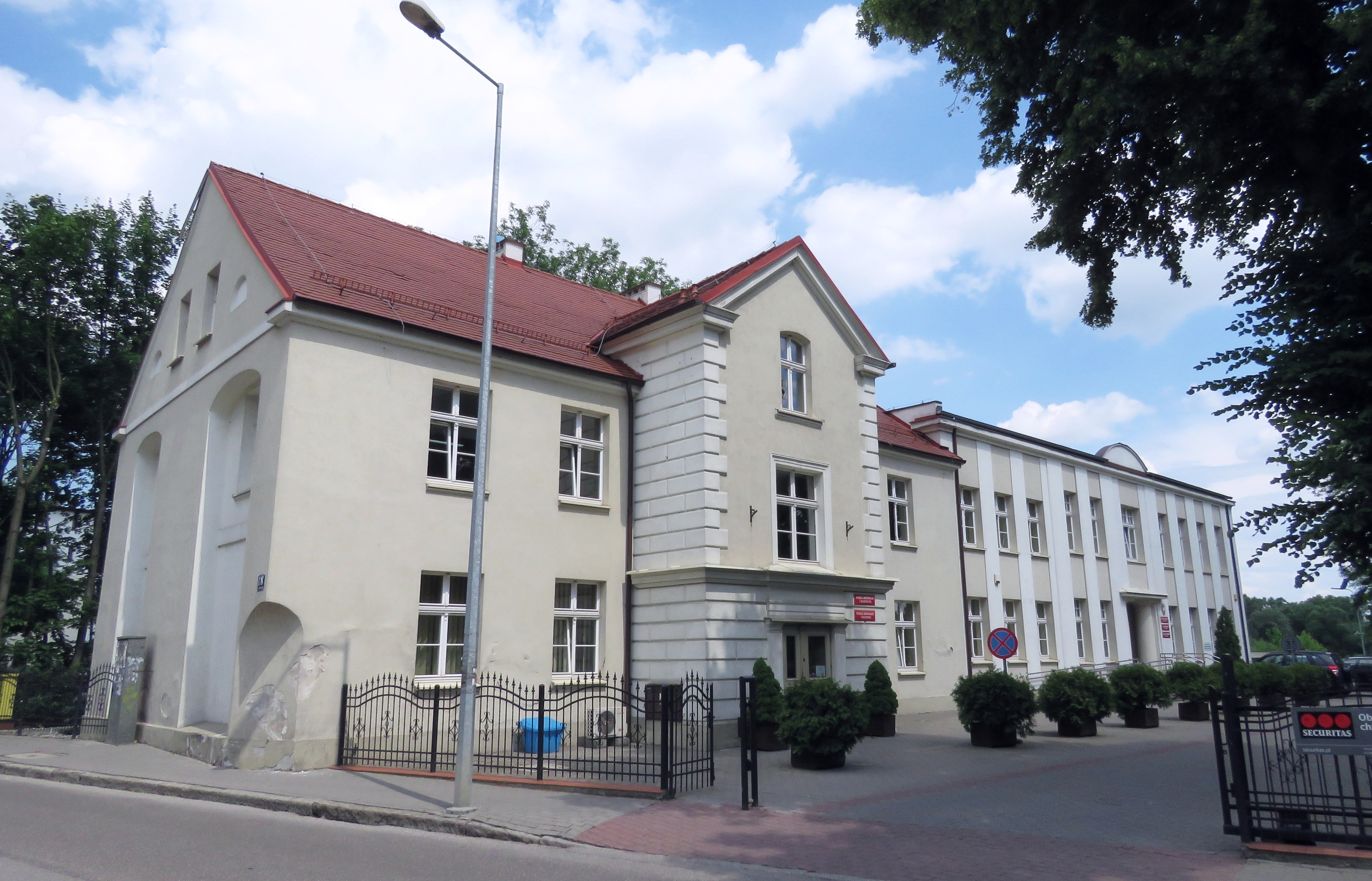 Starostwo Powiatowe w Brodnicy